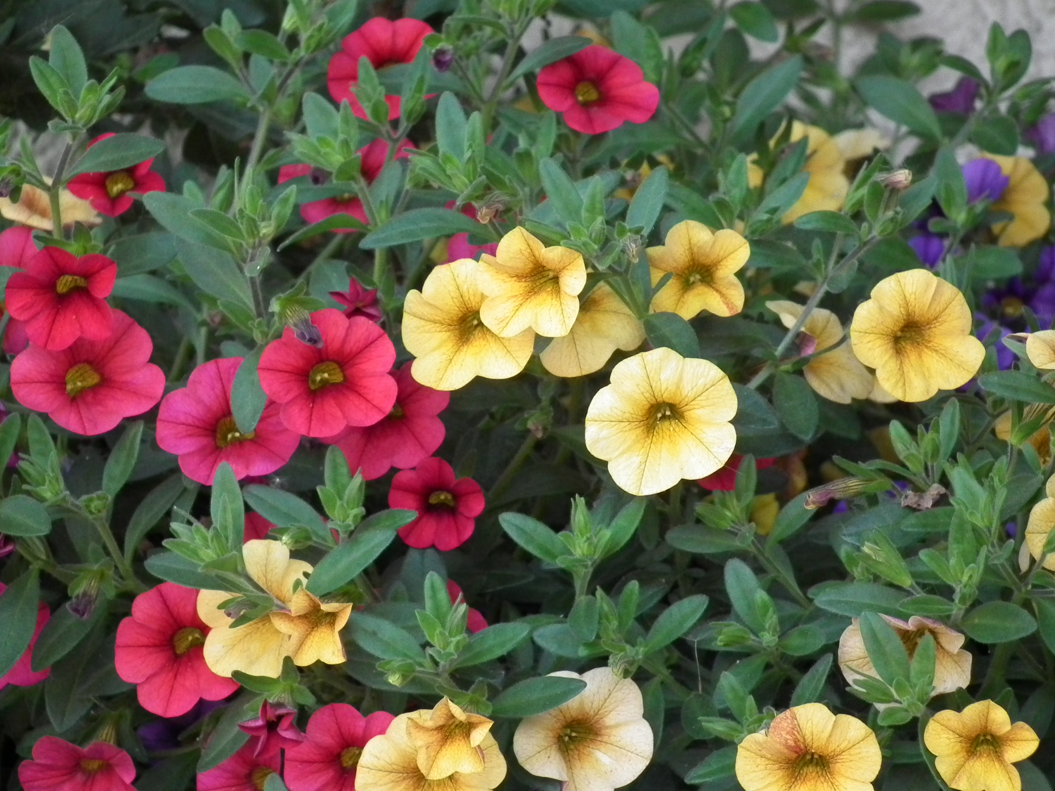 Calibrachoa-Hybriden "Million bells" in den Farben gelb und rot, fotografiert in Heidelberg (Baden-Württemberg, Deutschland)